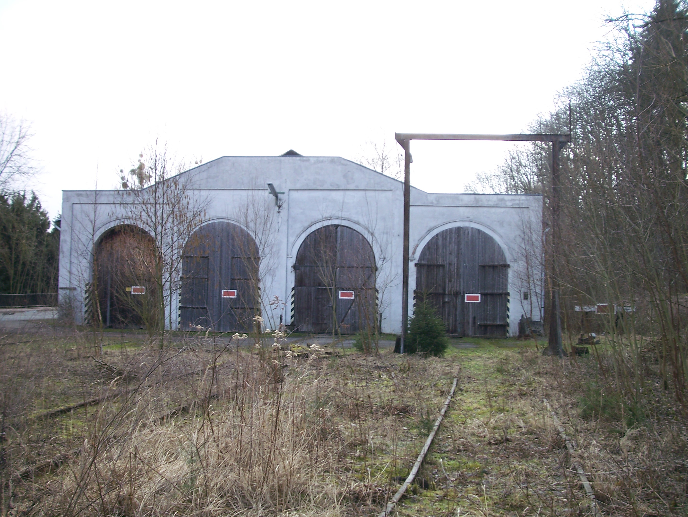 Lokschuppen des ehemaligen "Bahnwerk Bodenwerder", in Bodenwerder-Linse (Vorwohle-Emmerthaler Eisenbahn)